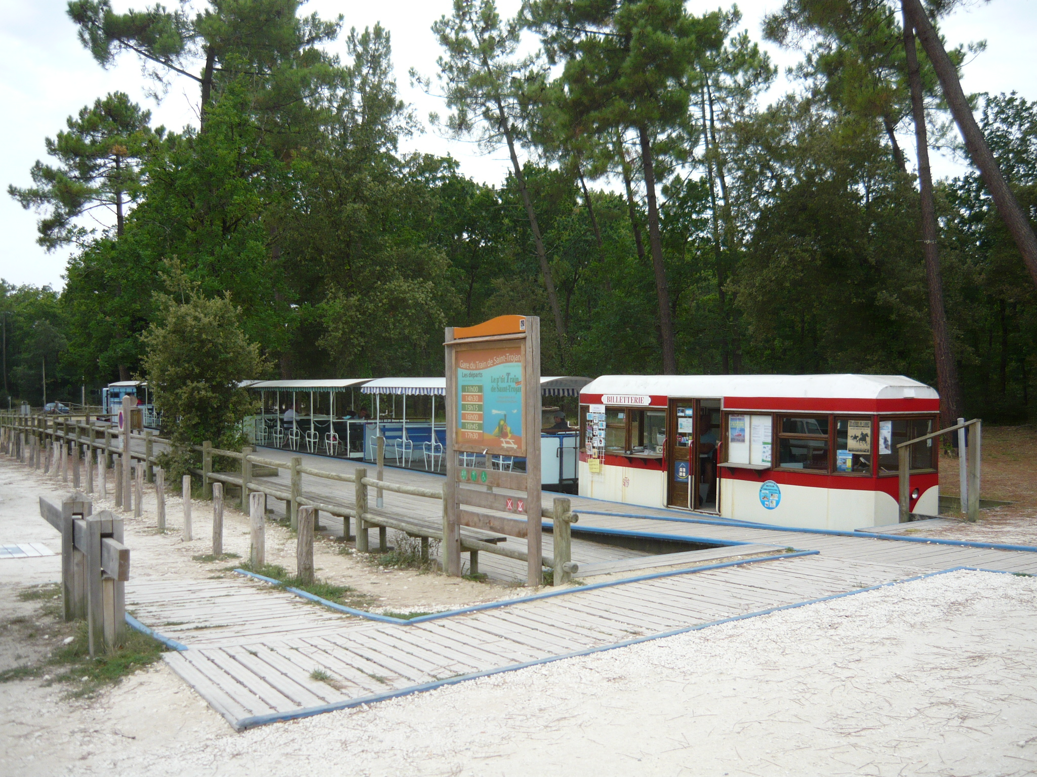 La turista trajno de Saint-Trojan-les-Bains.